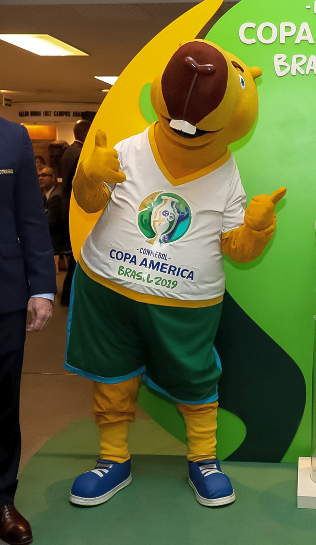 (São Paulo - SP, 14/06/2019) Presidente da República, Jair Bolsonaro e Zizito, mascote da Copa América. Foto: Marcos Corrêa/PR